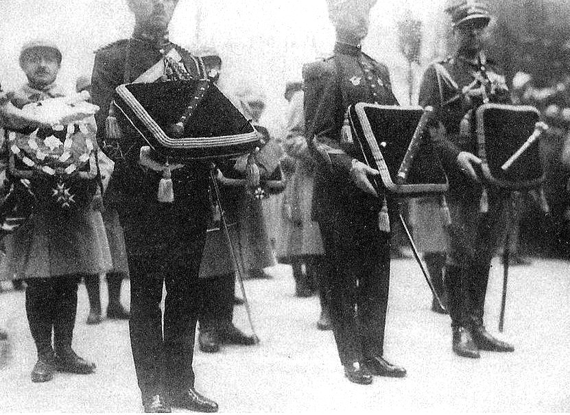 Jour des funérailles de Foch. Bâton de maréchal de France, du Royaume-Uni et de Pologne.